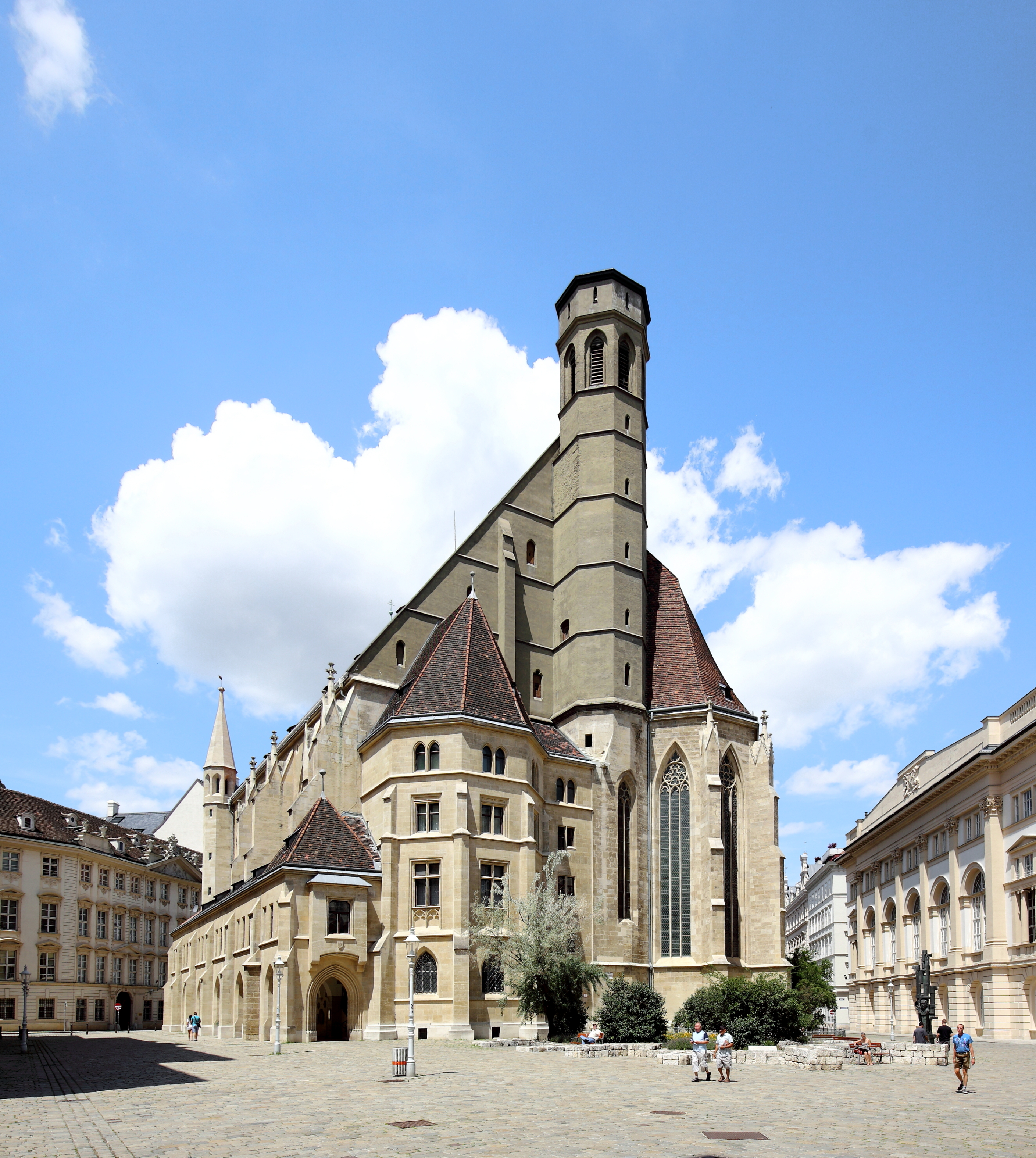 Südostansicht der Minoritenkirche am Minoritenplatz im 1. Bezirk der österreichischen Bundeshauptstadt Wien. Vor der Minoritenkirche der mit Steinen nachgezeichnete Grundriß der mittelalterlichen Ludwigskapelle, die im 18. Jahrhundert zu einem Wohnhaus umgebaut und 1905 abgerissen wurde.